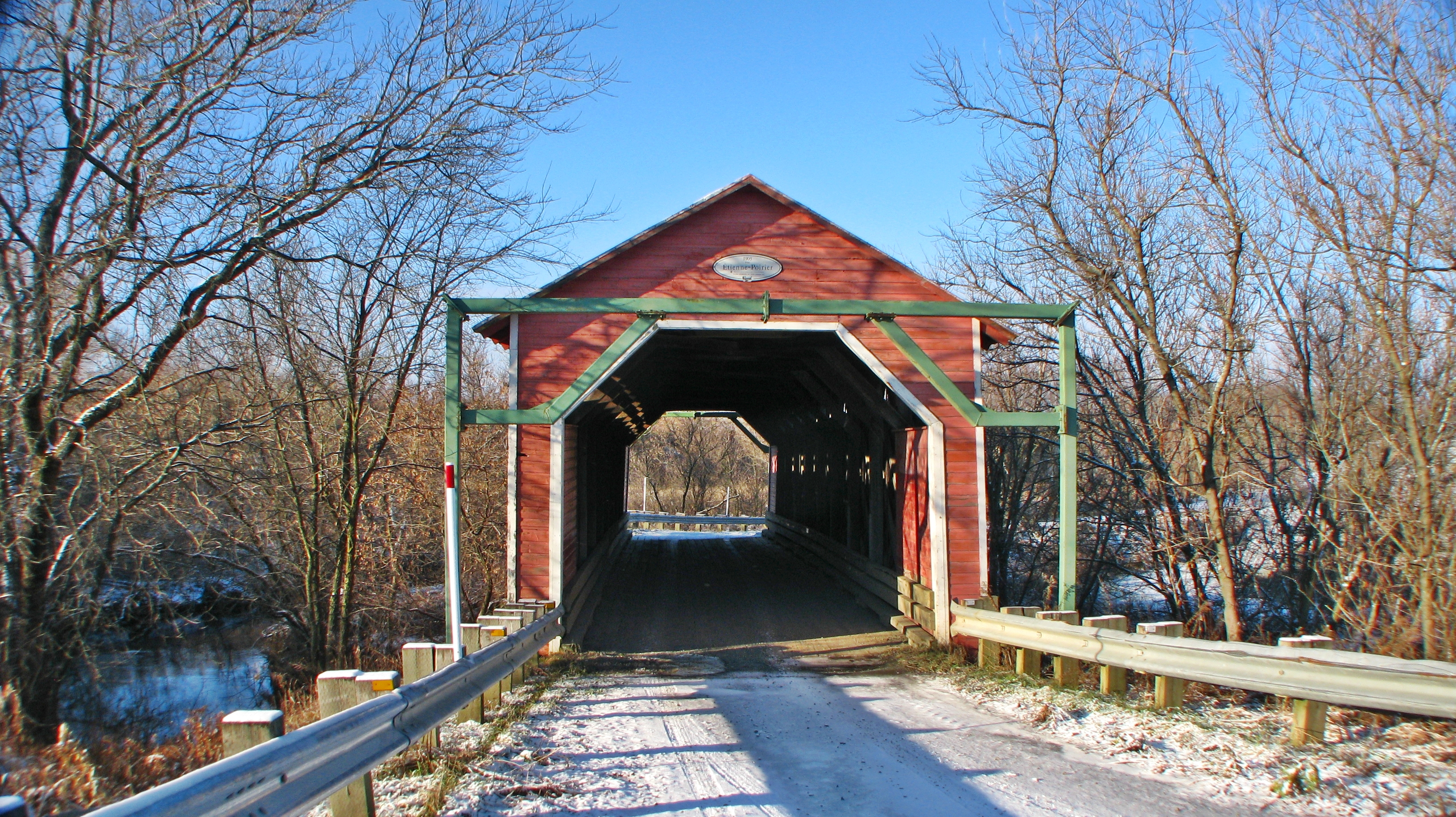 Pont Étienne-Poirier